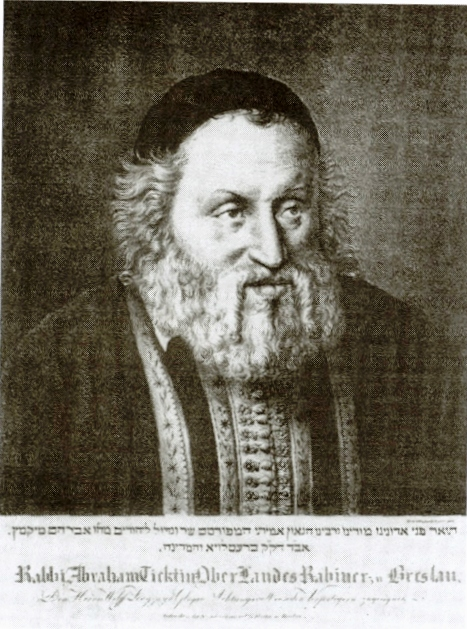 August Henschel (1783–1828), Rabbi Abraham Ticktin Oberlandesrabbiner in Breslau